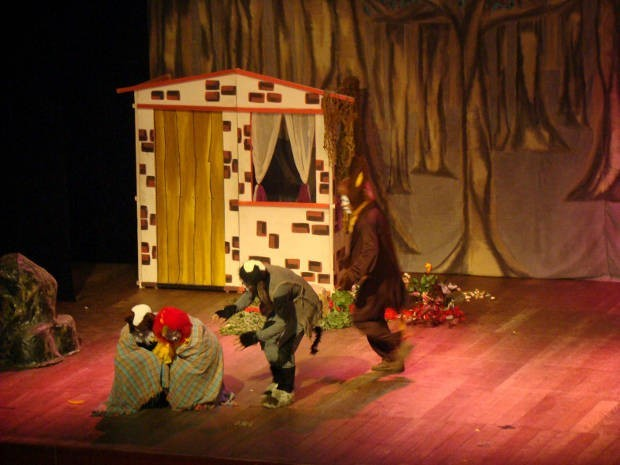 O GRUPO encenação cultural do Pará no Teatro da paz